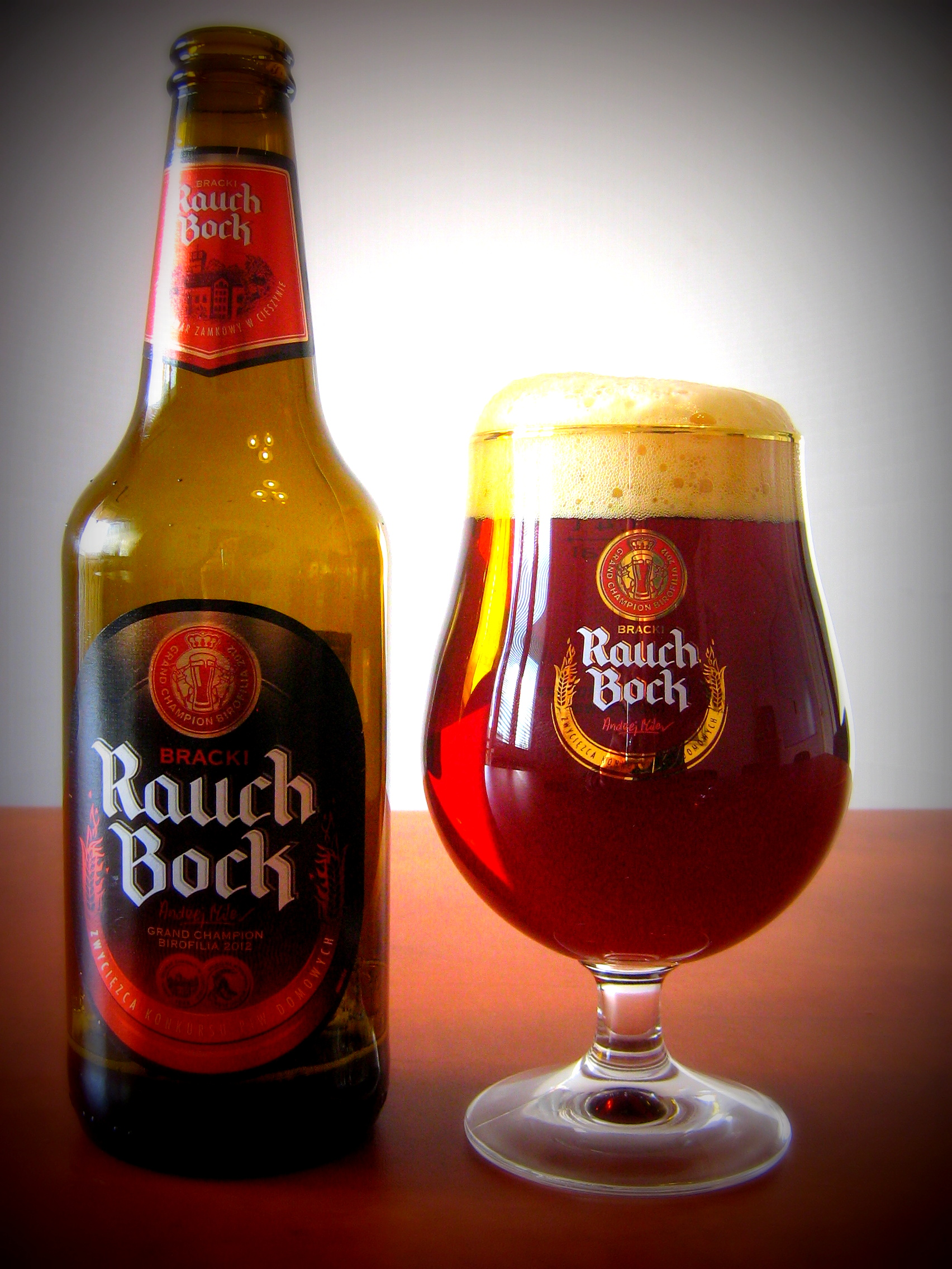 Zwycięskie piwo X Konkursu Piw Domowych w Żywcu. Uwarzone w Brackim Browarze Zamkowym w Cieszynie